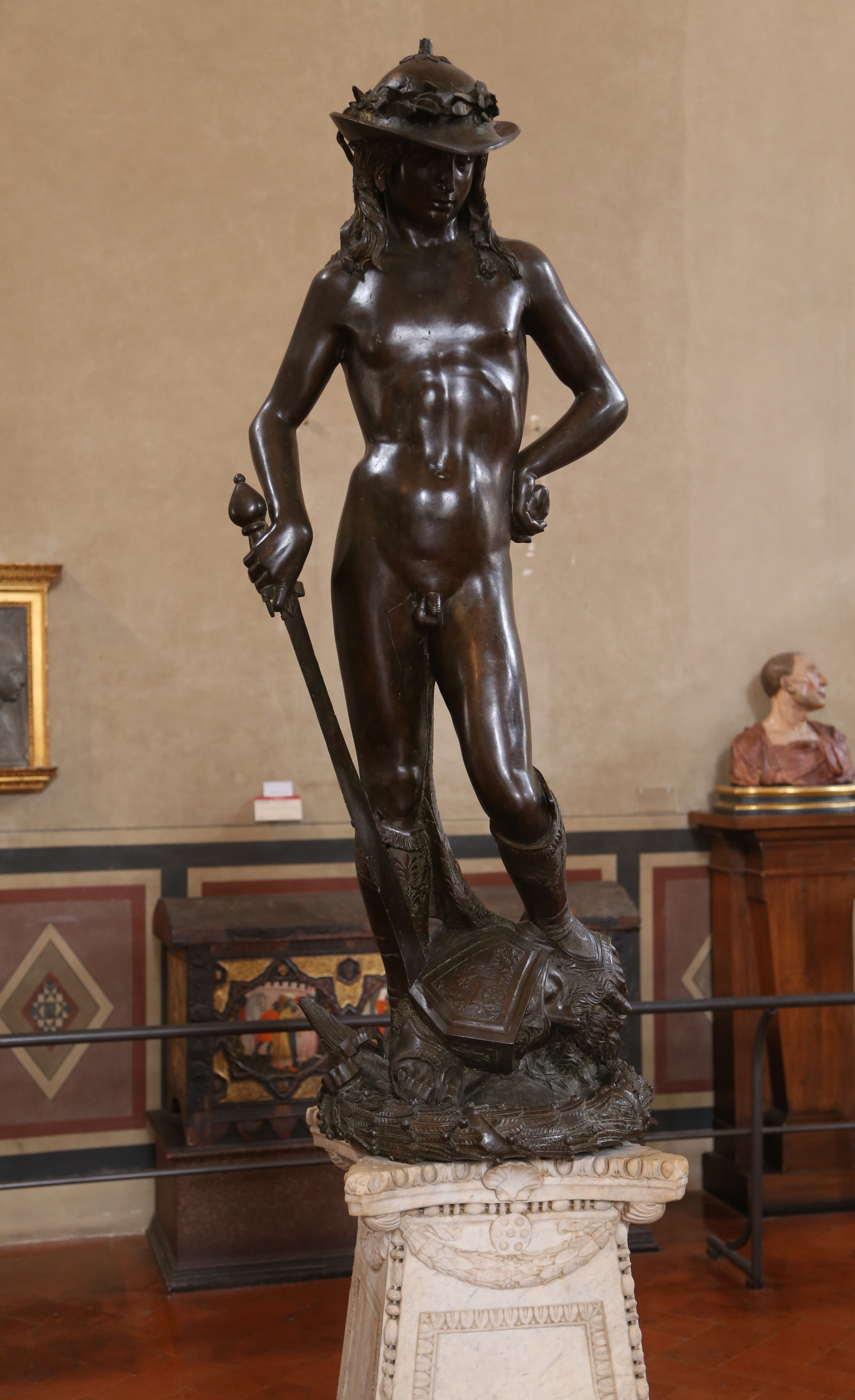 David, Donatello, ca. 1440, Bronze, Museo del Bargello, Florenz